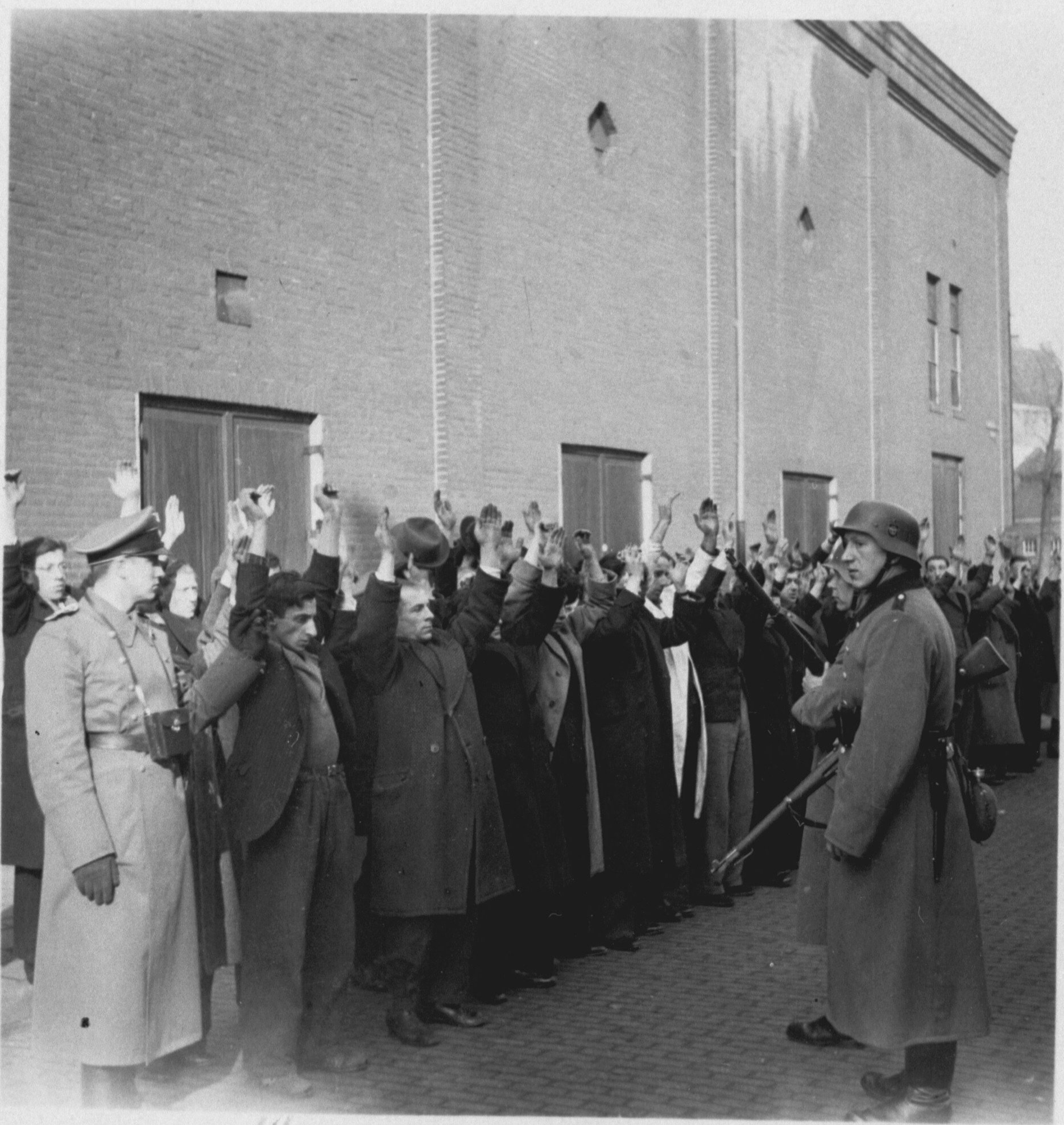 Tegen de muur van het Tip-Top Theater in de Jodenbreestraat te Amsterdam. Razzia op Joden. Himmler, Seyss-Inquart en Rauter besloten een voorbeeld te stellen: de eerste razzia op joden werd een feit. Op zaterdagmiddag 22 februari 1941 verscheen een colonne Duitse vrachtwagens in de buurt van het Waterlooplein. De omgeving werd geheel afgezet. Op meedogenloze wijze werden jonge joodse mannen op het Jonas Daniël Meijerplein bijeen gedreven. Ook op de dag daarop werden vele joodse mannen opgepakt. In totaal 427 joden tussen de twintig en vijfendertig jaar werden afgevoerd naar het kamp Schoorl.